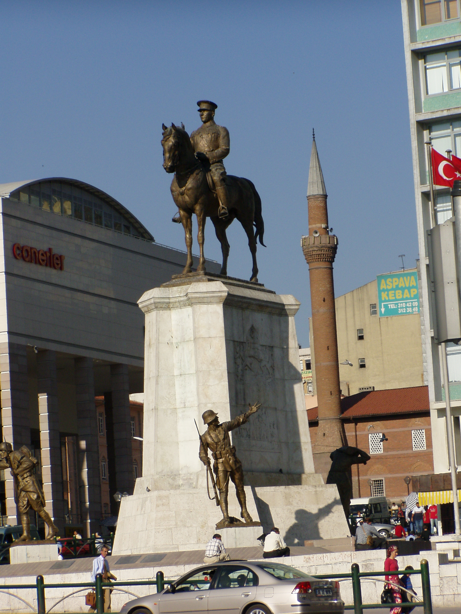 Atatürks Reiterdenkmal auf dem Ulus Meydanı